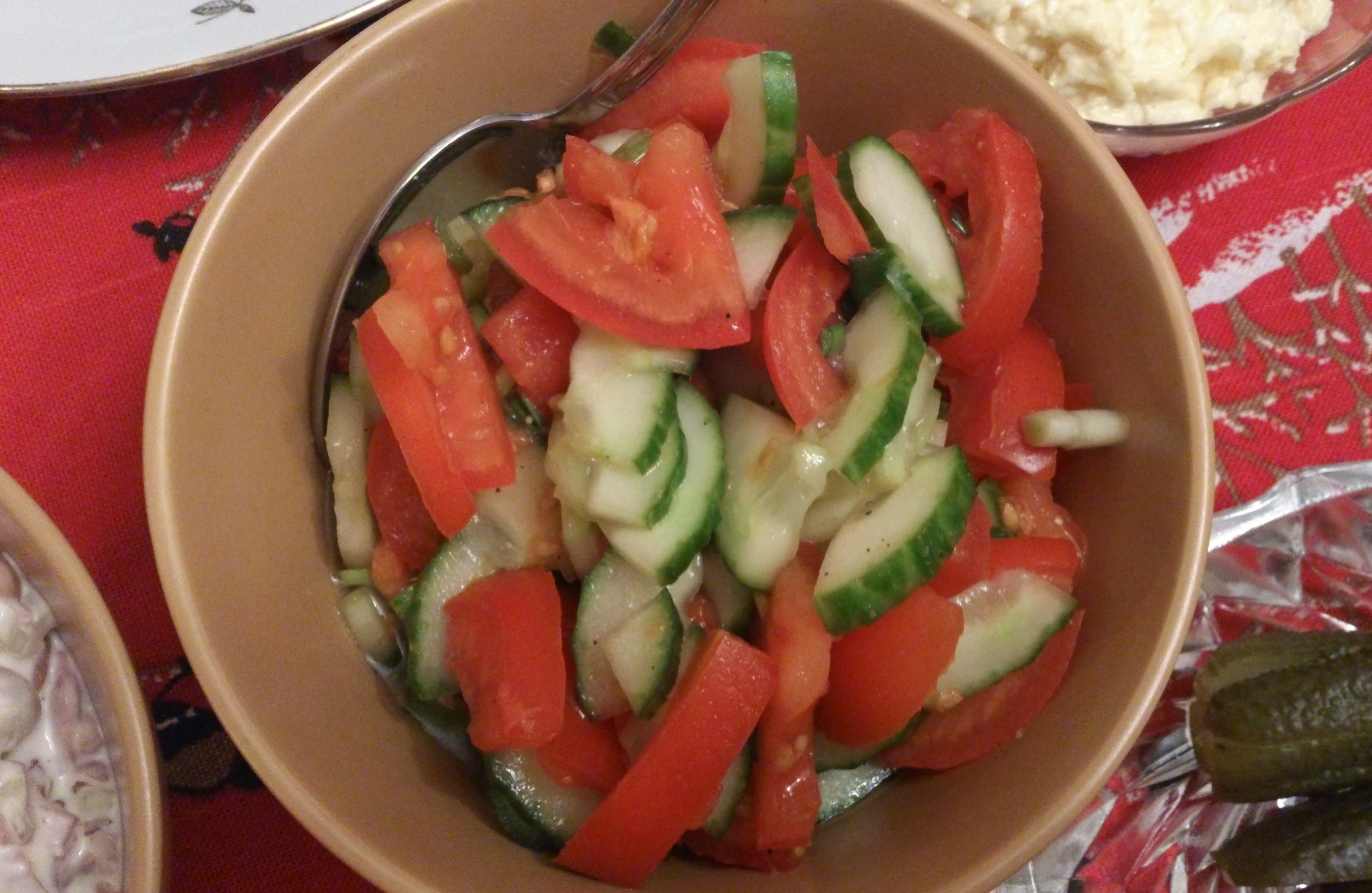 Tomati-kurgisalat